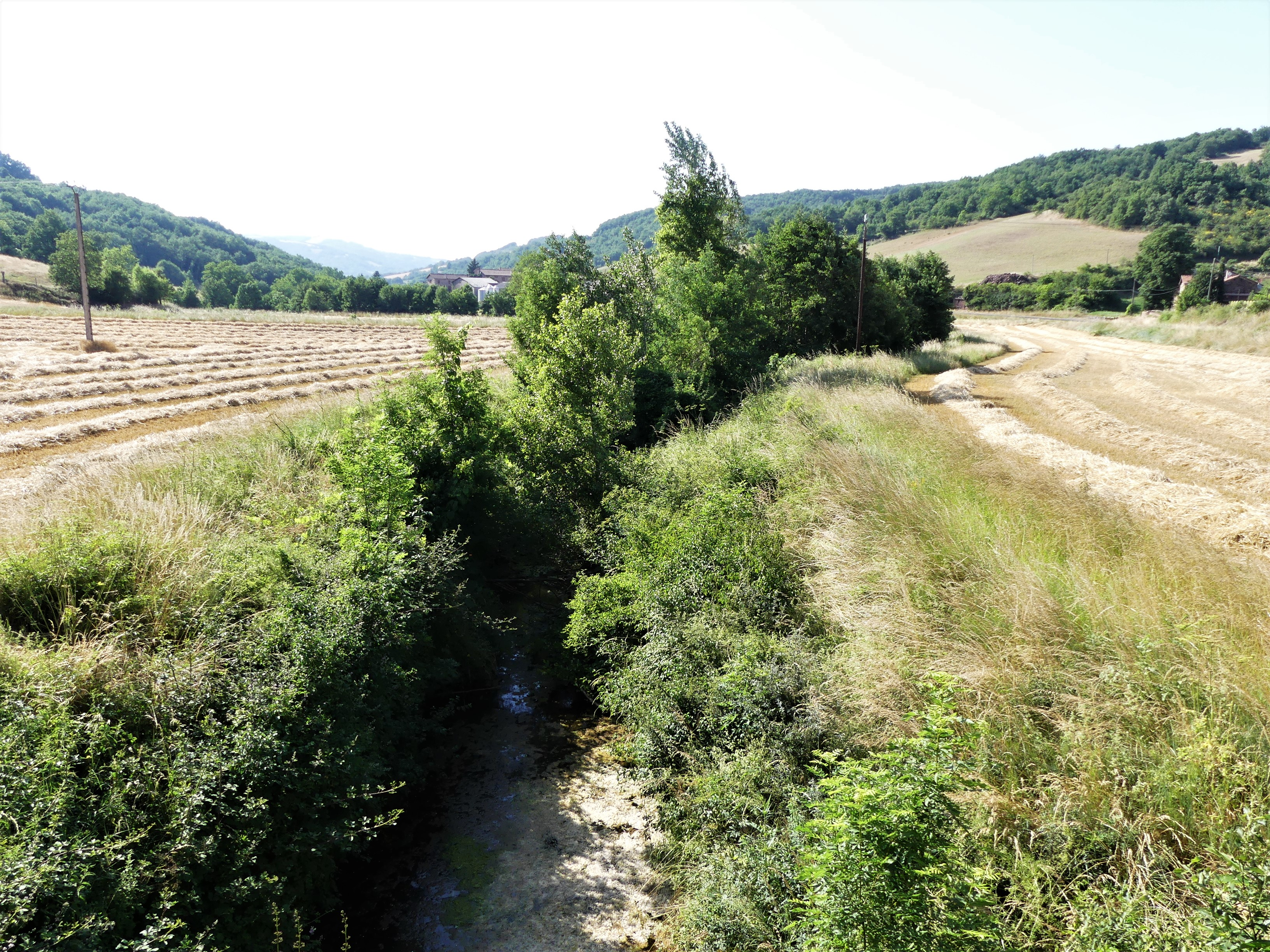 Le Gos (affluent du Tarn) au pont de la Bastende, Saint Juéry, Aveyron, France. Vue prise en direction de l'aval.